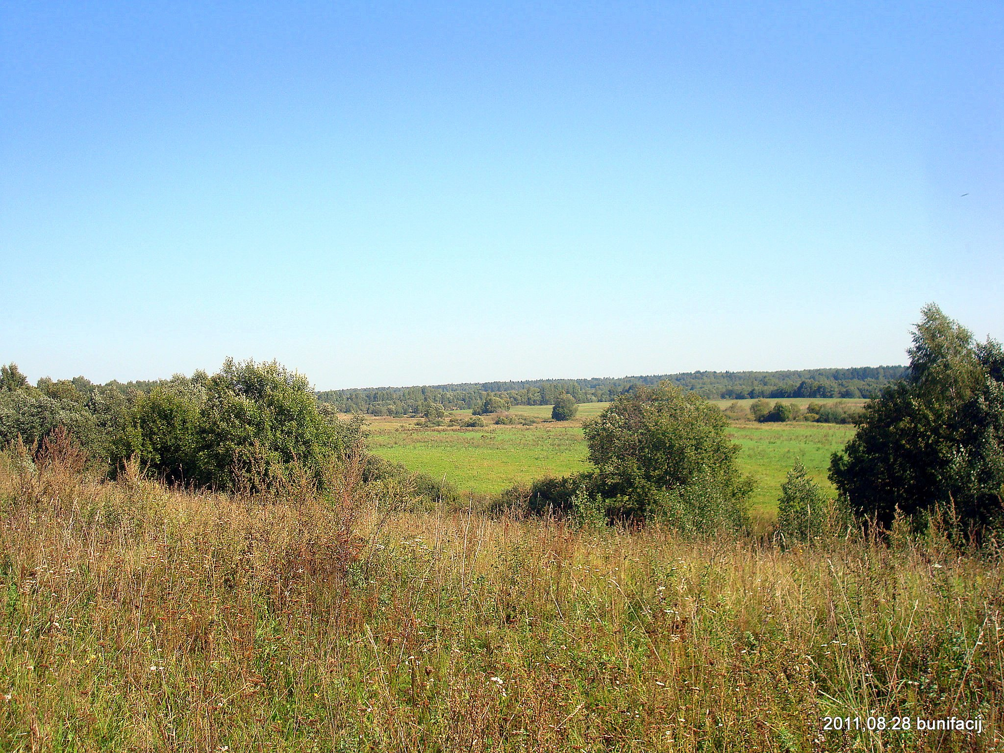 Пейзаж